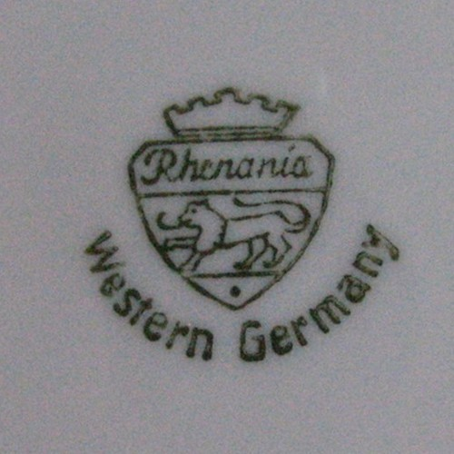 Porzellanmarke Rhenania Duisdorf, Ende der 1950er Jahre